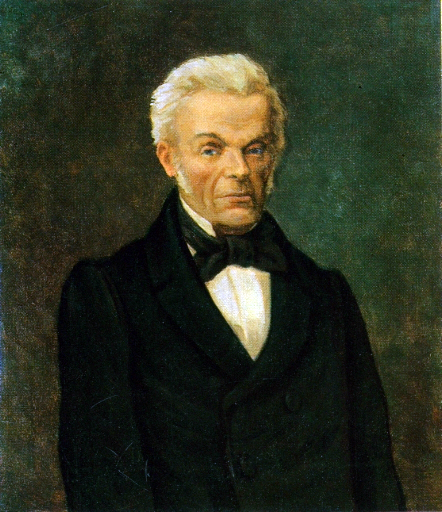 Painting.